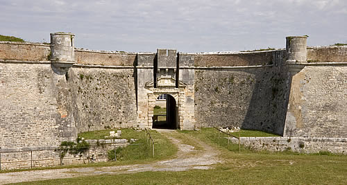 Fort La Prée - La Flotte - île de Ré - Charente-Maritime Photo issue de ma banque d'images personnelle : Alain - Pep.per 8 septembre 2006 à 00:51 (CEST)